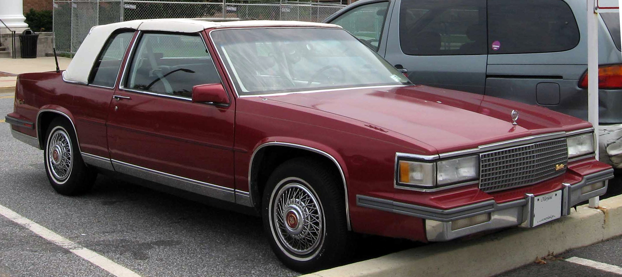 1985-1988 Cadillac Coupe de Ville photographed in USA.